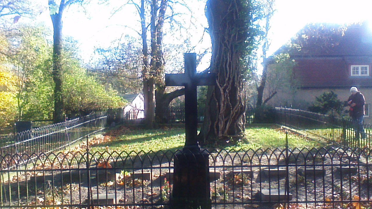 Herman Christoph von Hertell Vorfahre aller lebenden Hertells und mit diesen in blutsverwandtschaftlicher Beziehung stehenden Trägern anderer Namen, ist hier begraben.